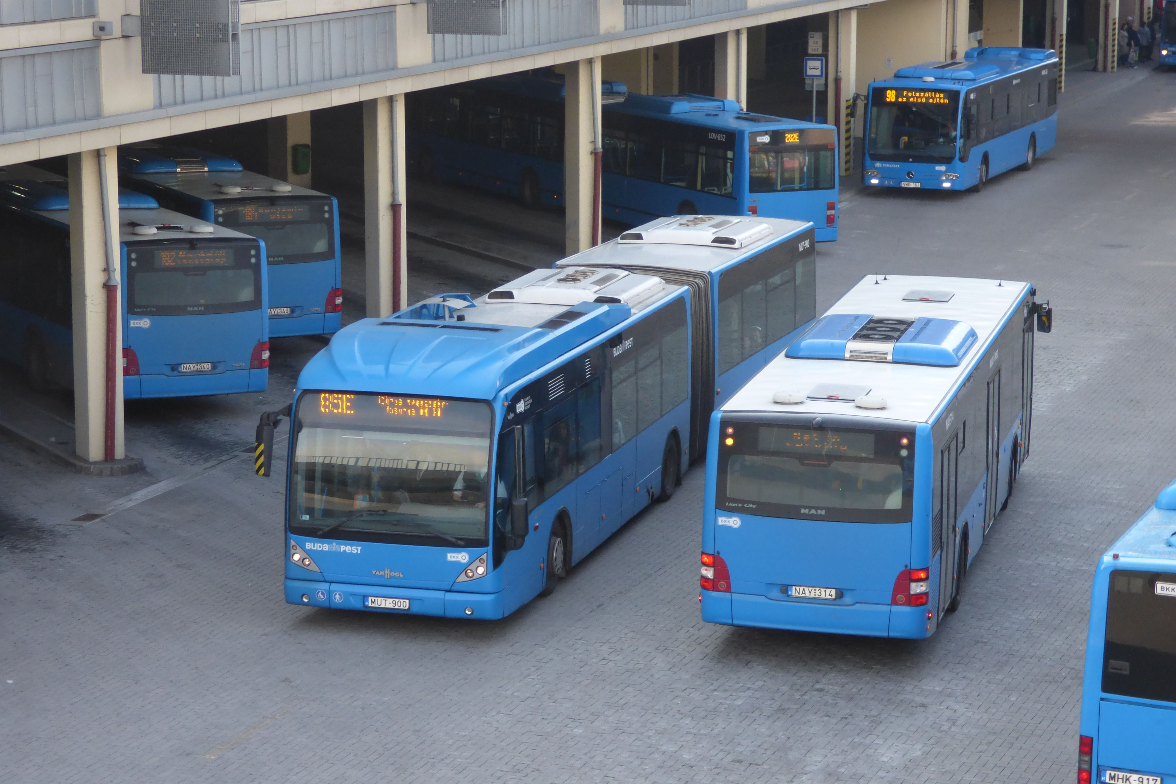 85E jelzésű Van Hool newAG300-as és egy MAN A21 Lion's City busz találkozása Kőbánya-Kispesten